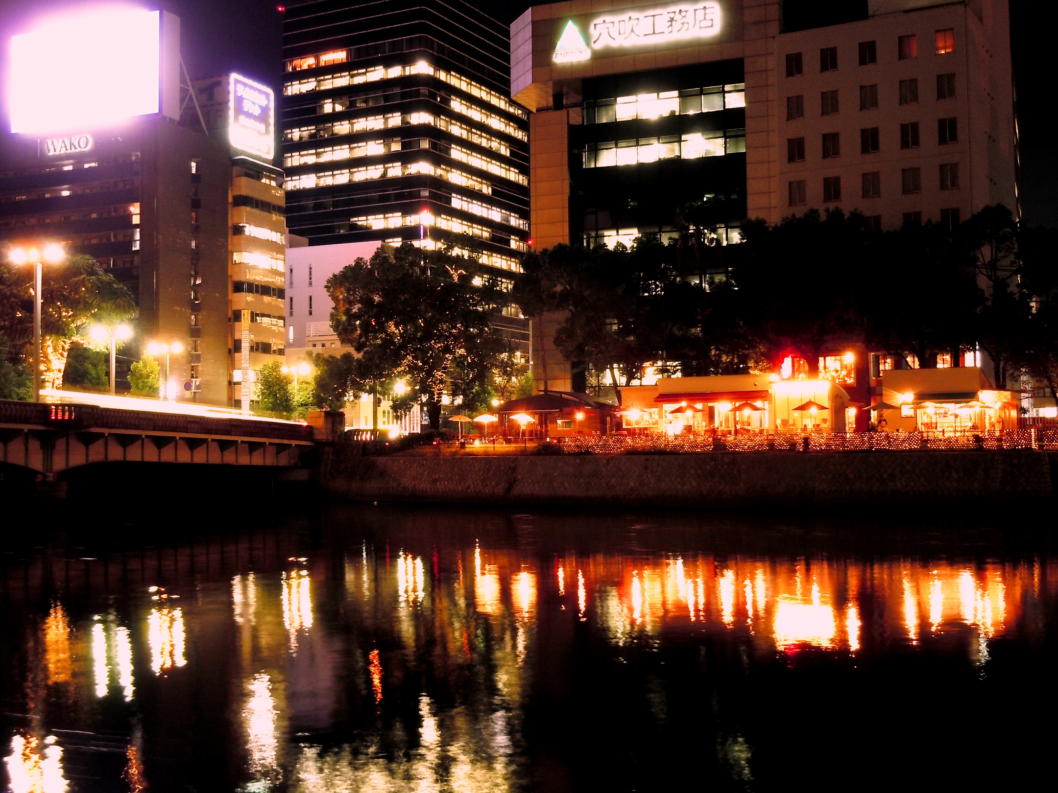 広島市京橋川。